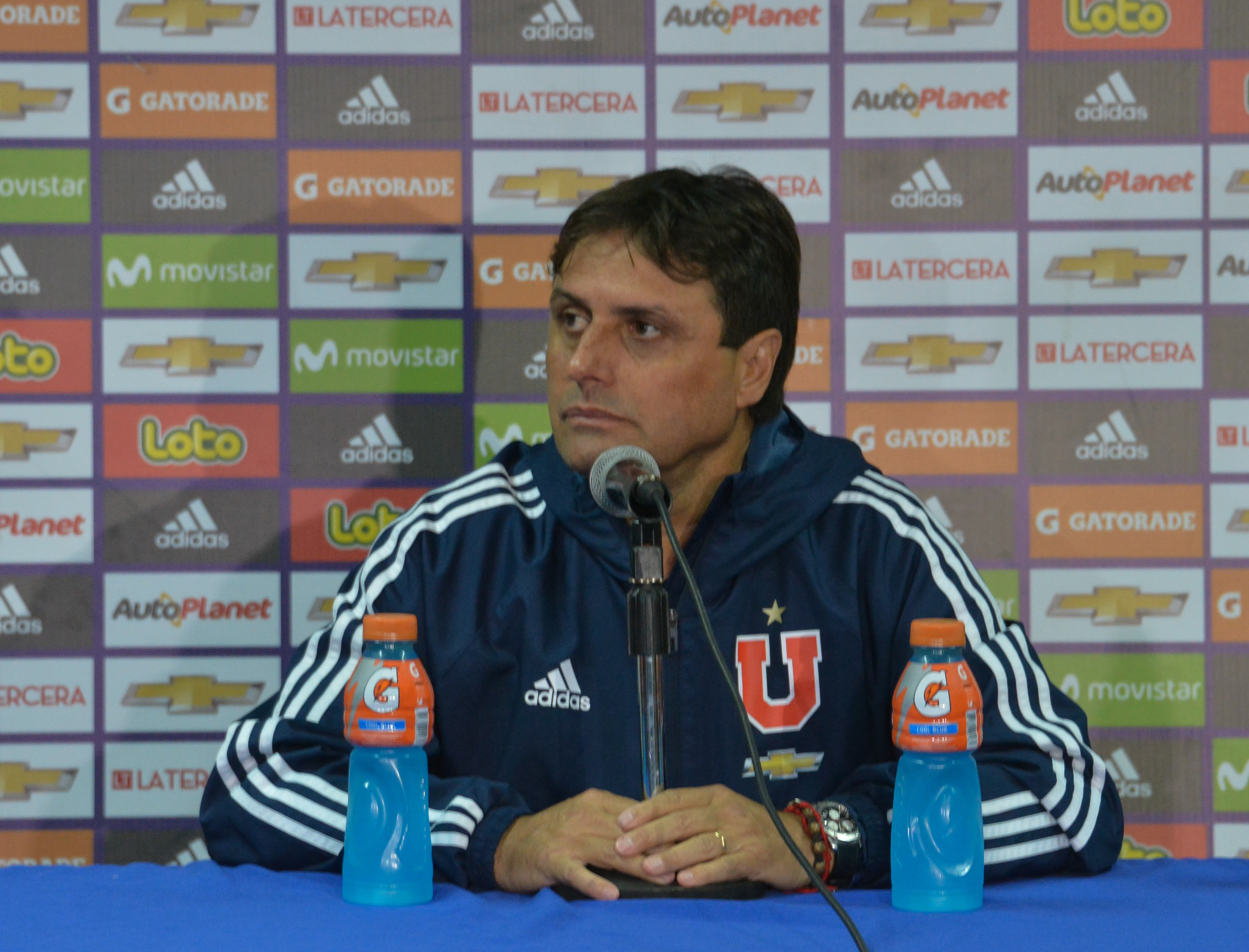 Ángel Guillermo Hoyos, Universidad de Chile v Deportes Antofagasta, Estadio Nacional, Santiago, Chile.